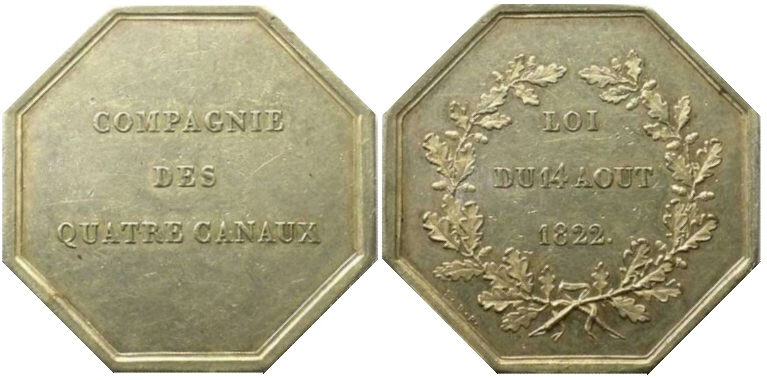 Jeton de la société des Quatre canaux.